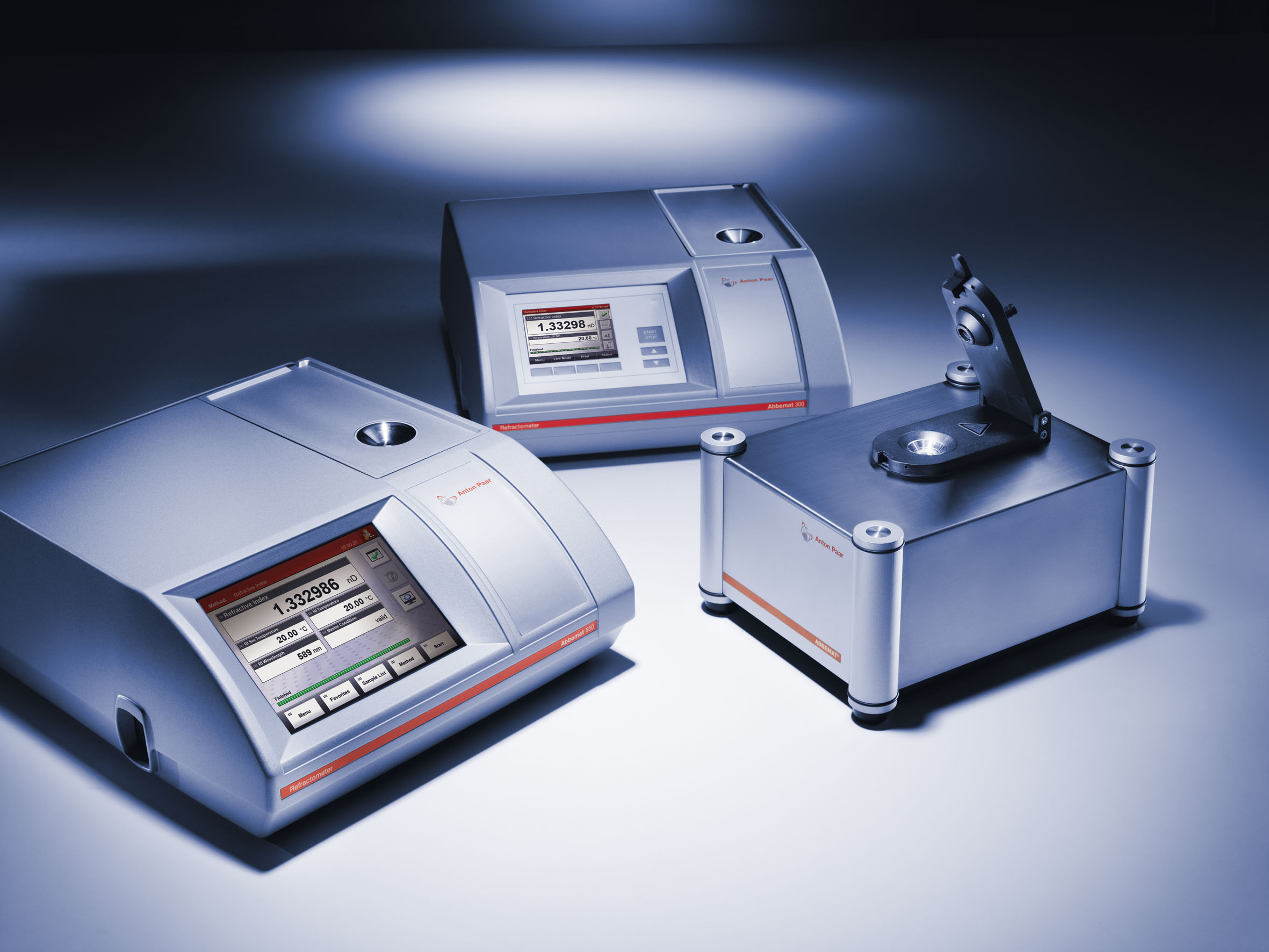 Die Abbemat Familie